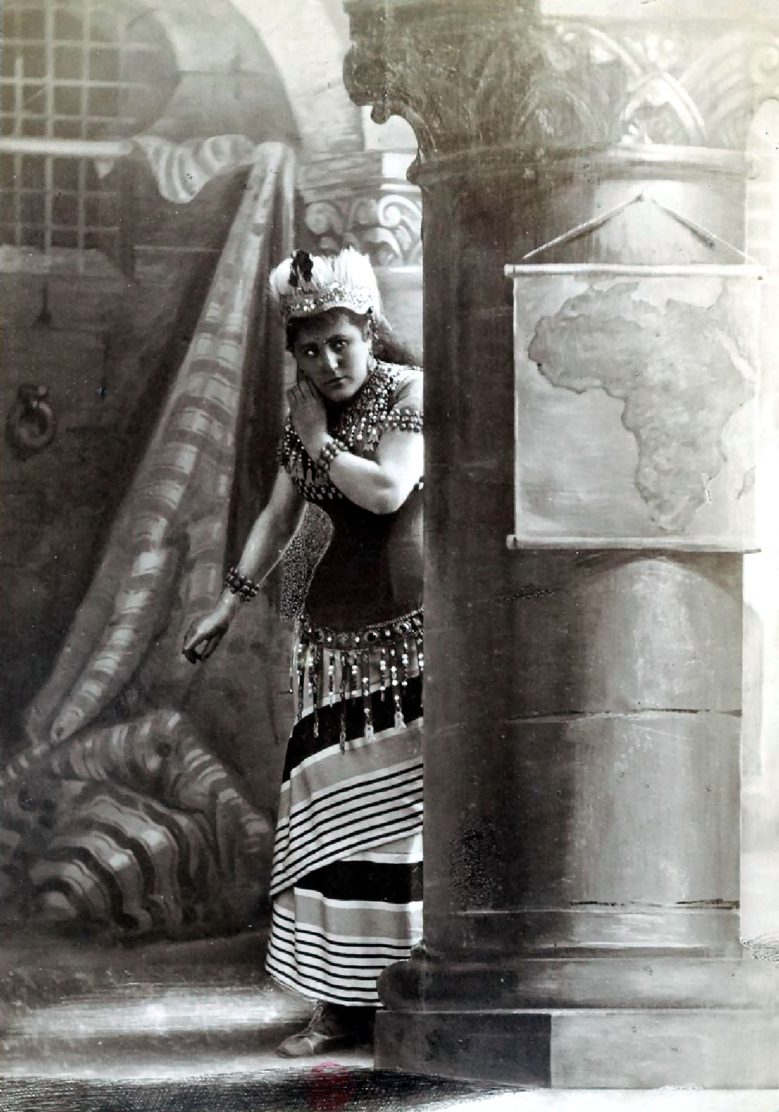 Maria Gabriele Krauss dans le rôle de Sélika de L'Africaine de Meyerbeer (acte II)